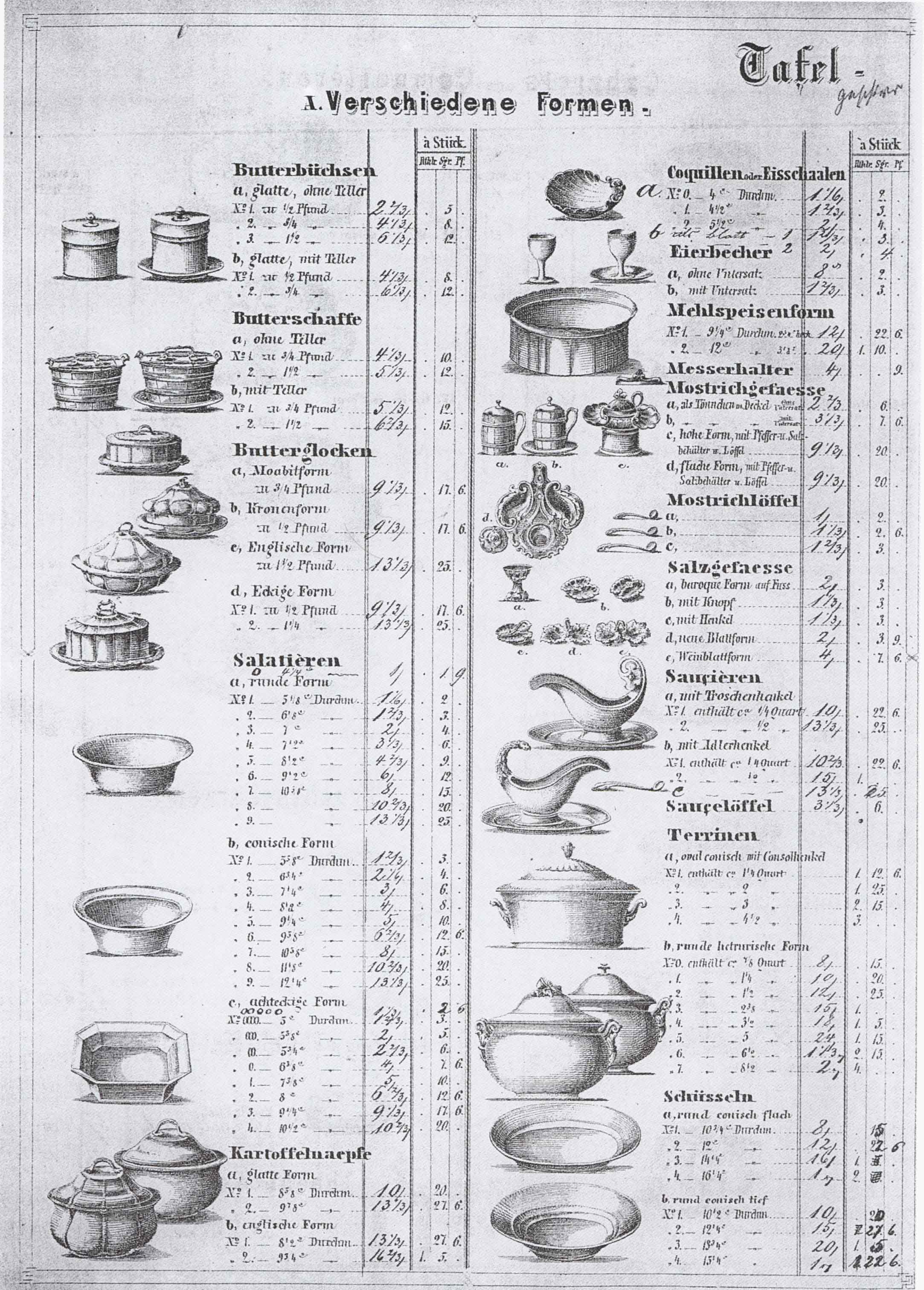 Fragment Katalogu C.T. z około 1860 roku.